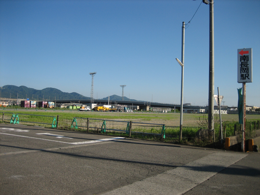 南長岡駅入口